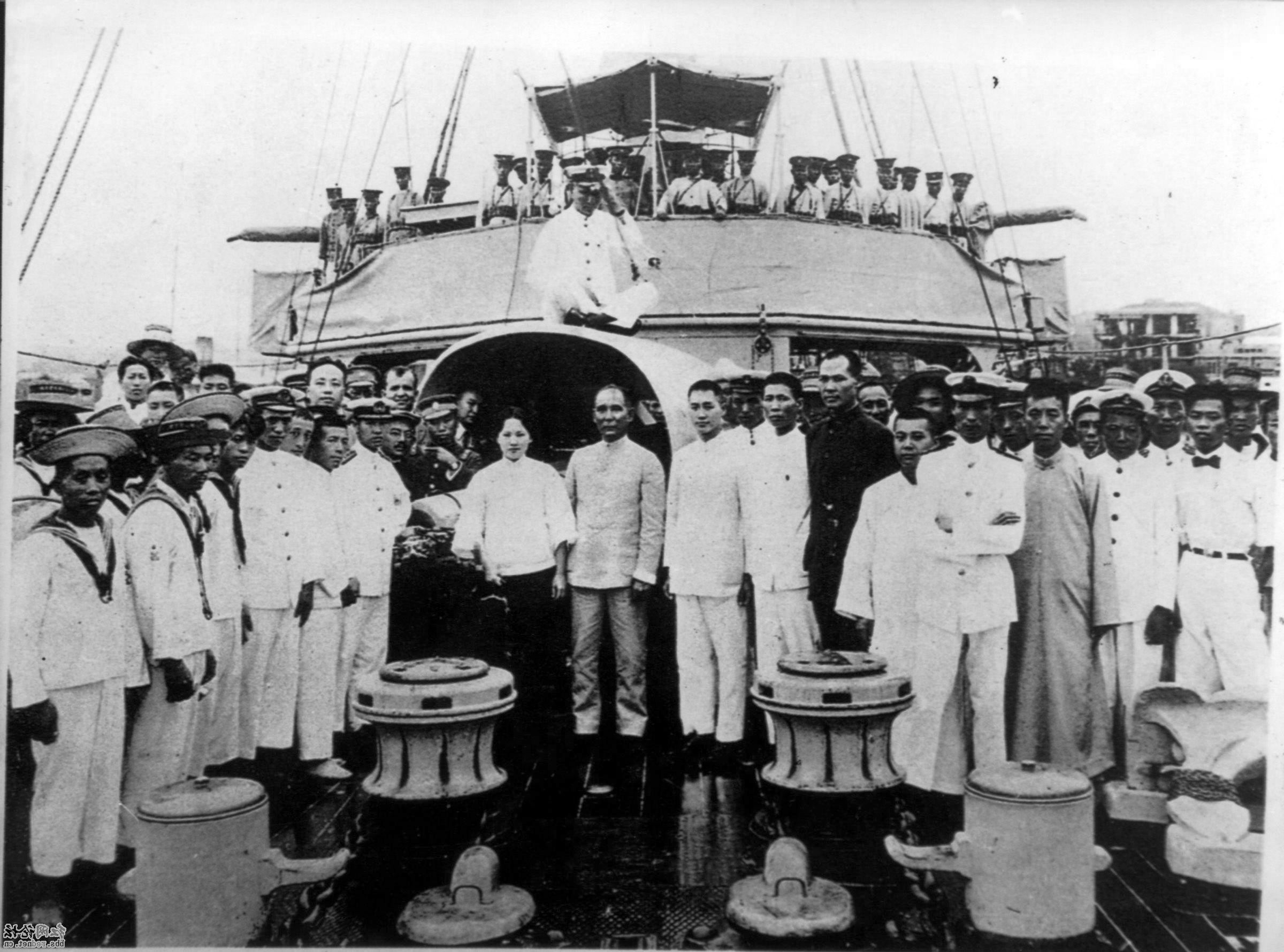 「永豊艦」（のちの中山艦）乗組員らと孫文夫妻。